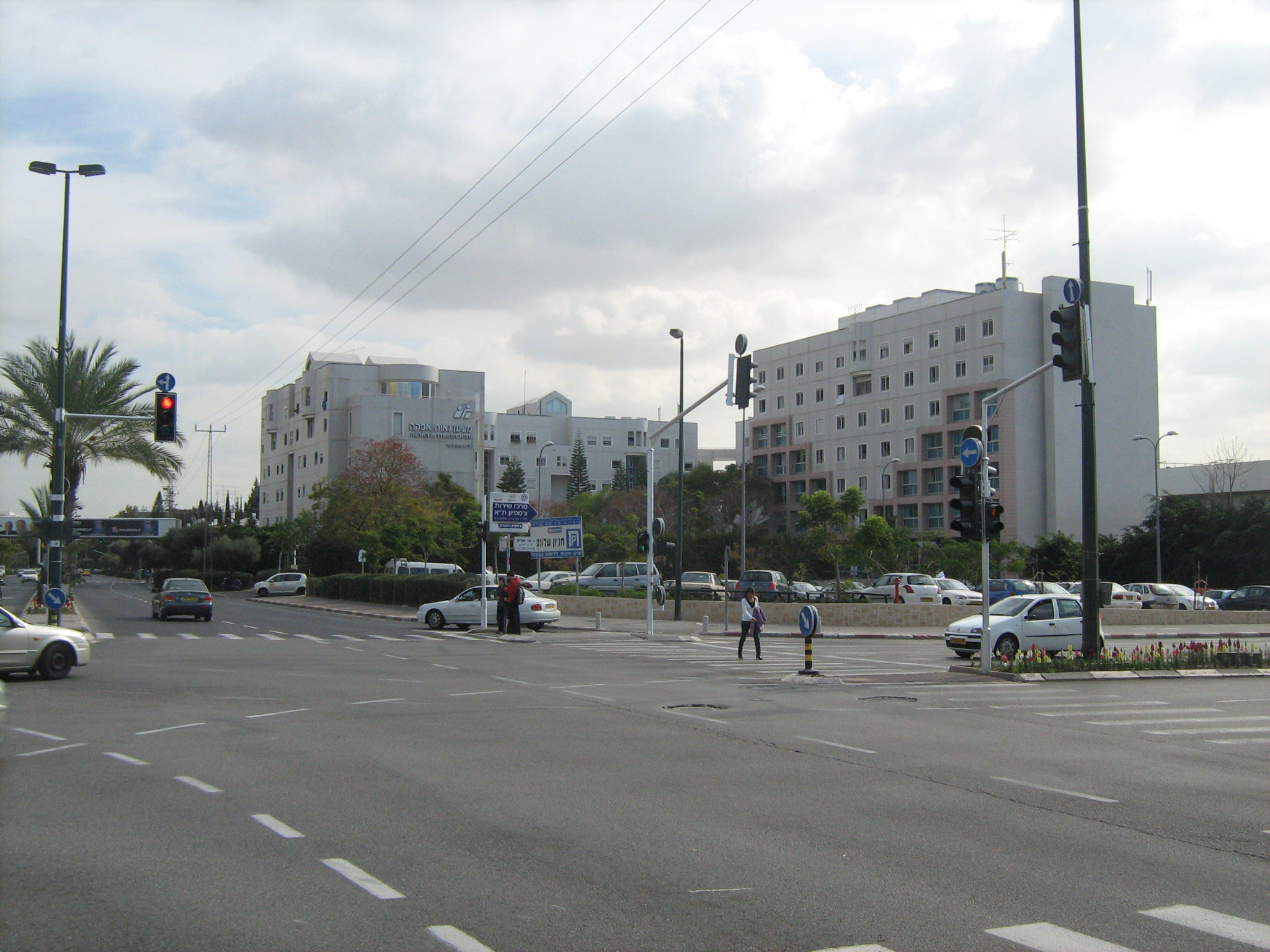 נאות אפקה (צומת הרחובות קק"ל ובני אפרים)